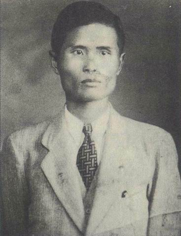 阮朝日 先生